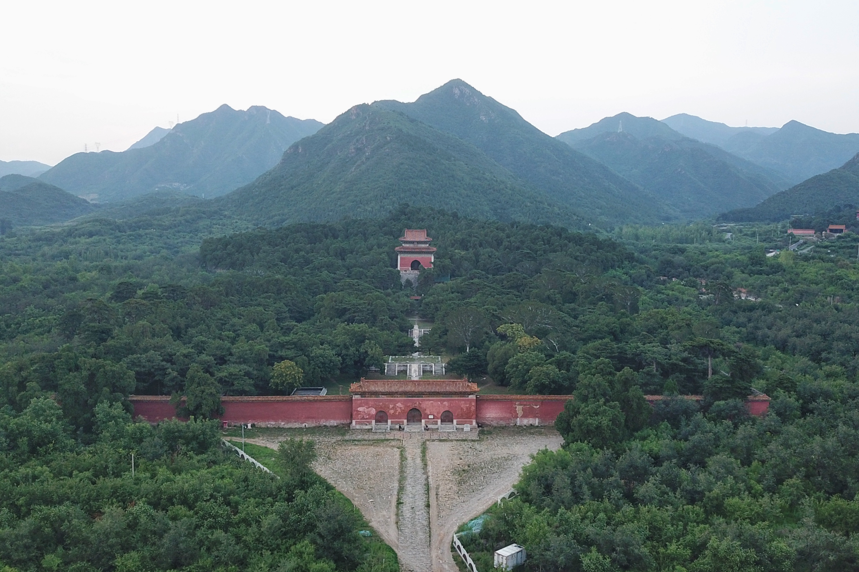 中文（中国大陆）: 明永陵，明世宗朱厚熜与陈皇后、方皇后、杜皇后的合葬墓